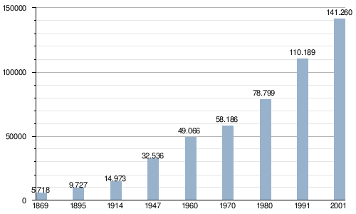 Crecimiento poblacional del Departamento Capital - Provincia de Catamarca